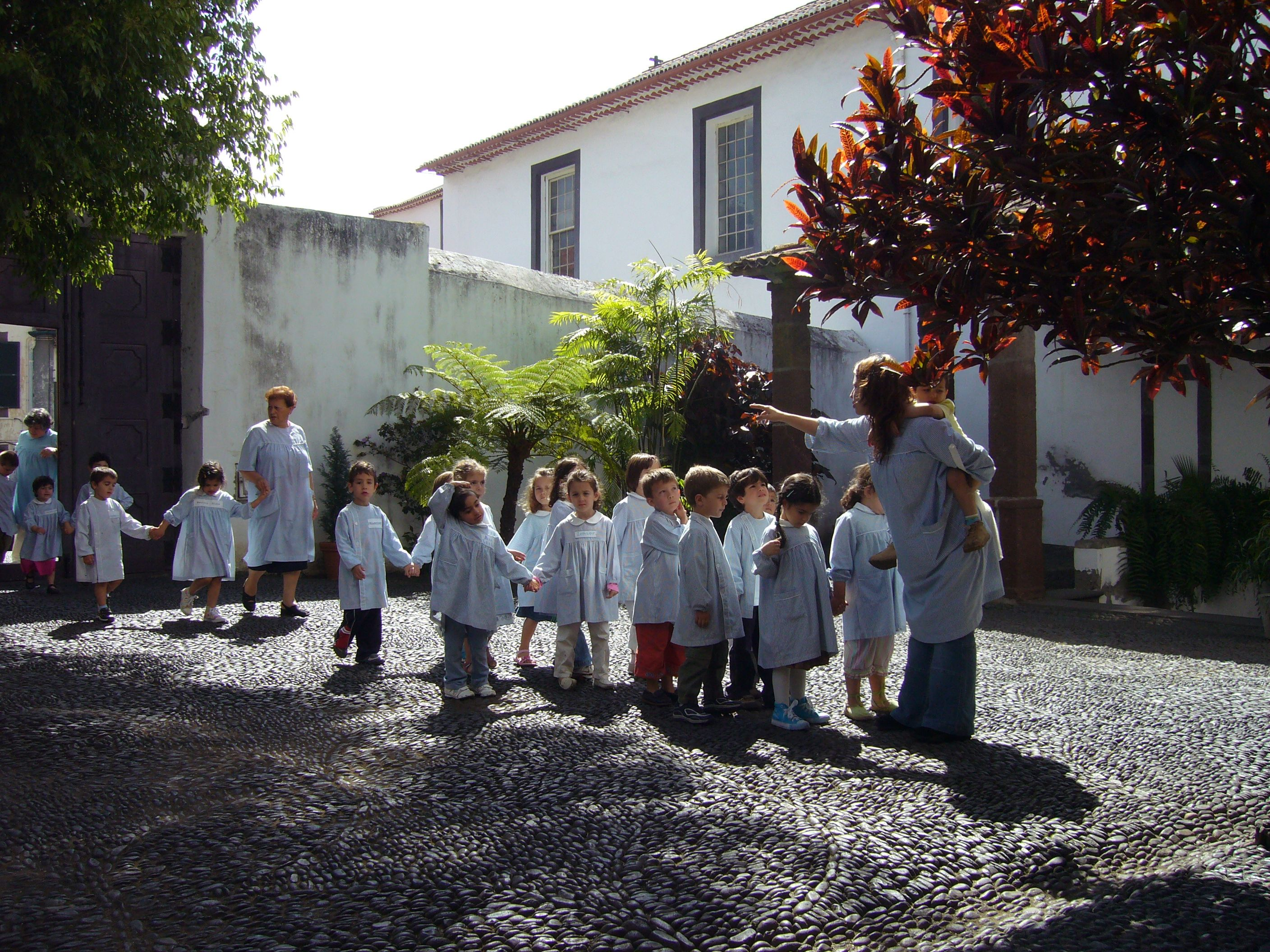 Kindergarten at Madeira -Funchal -Santa Clara